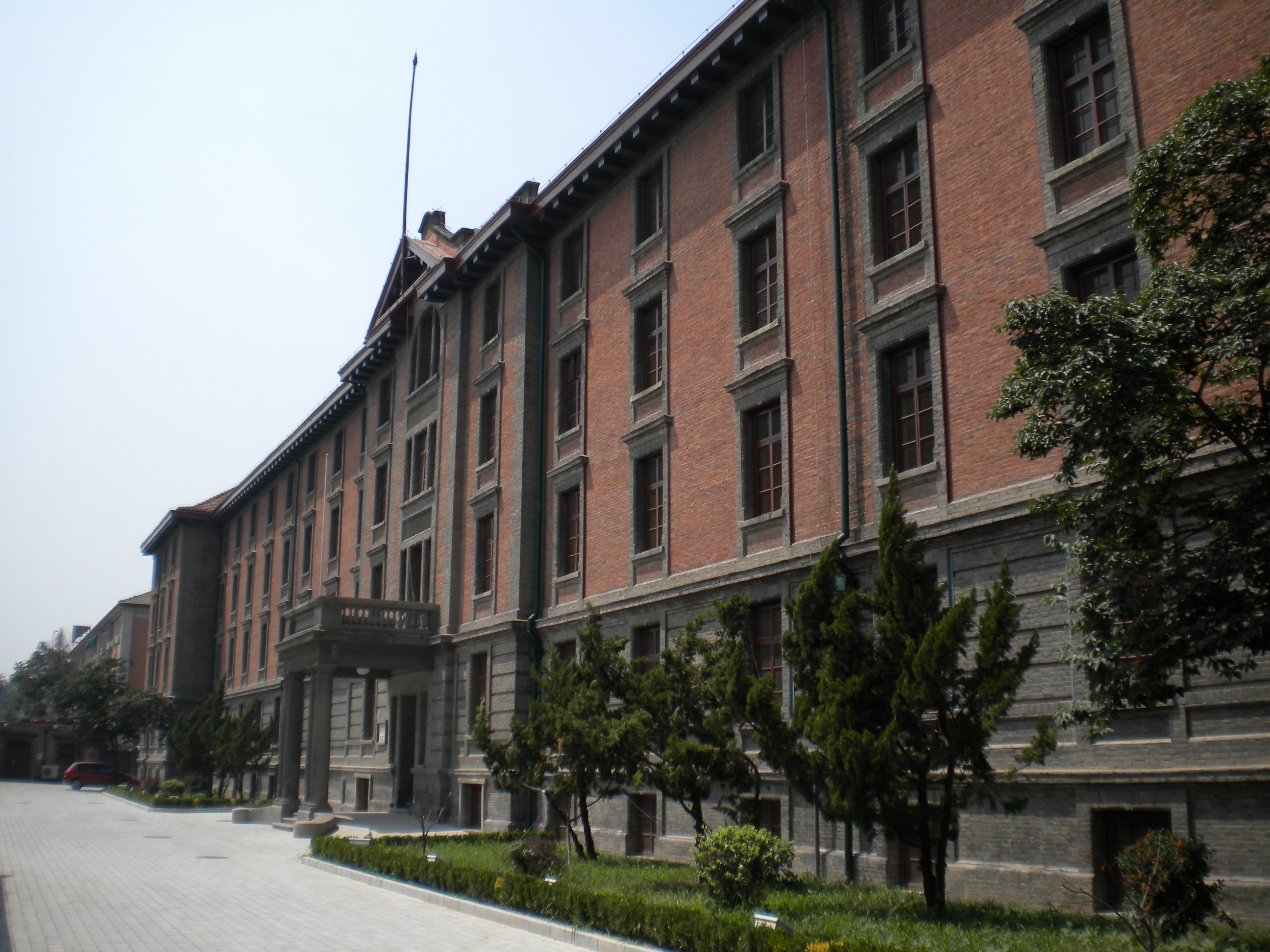 北京沙滩北大红楼